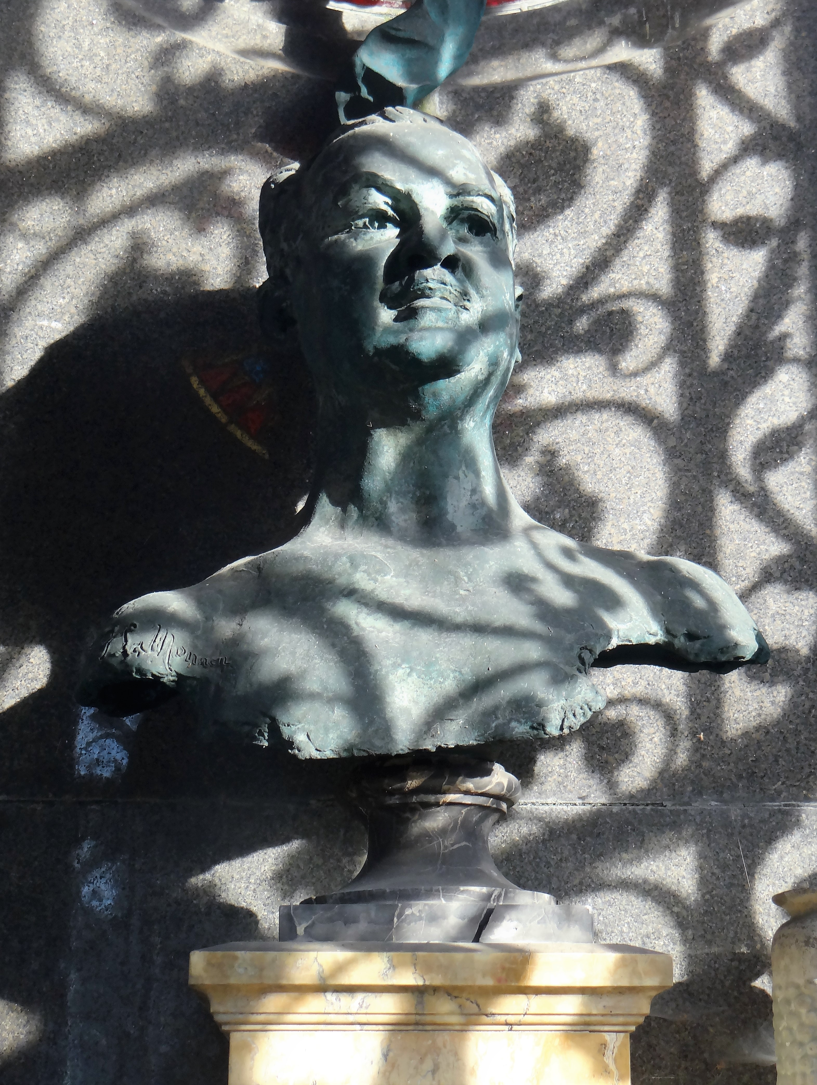 Paris - Cimetière Saint-Vincent - Chapelle de Léon Cornuché (1867-1926), créateur du casino de Deauville et du restaurant Maxim's. Buste par Francis La Monaca